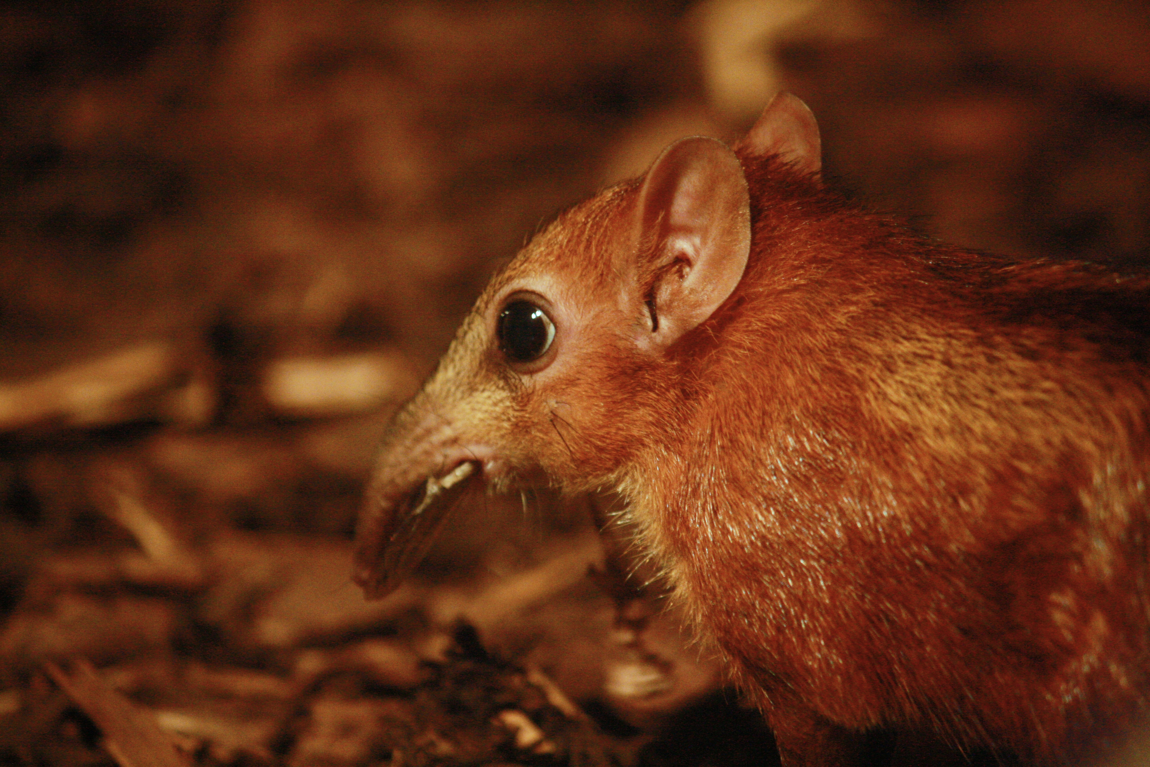 Bércoun skvrnitý v Pražské Zoo